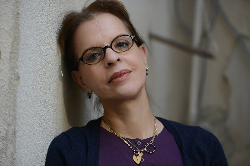 חגית שחל